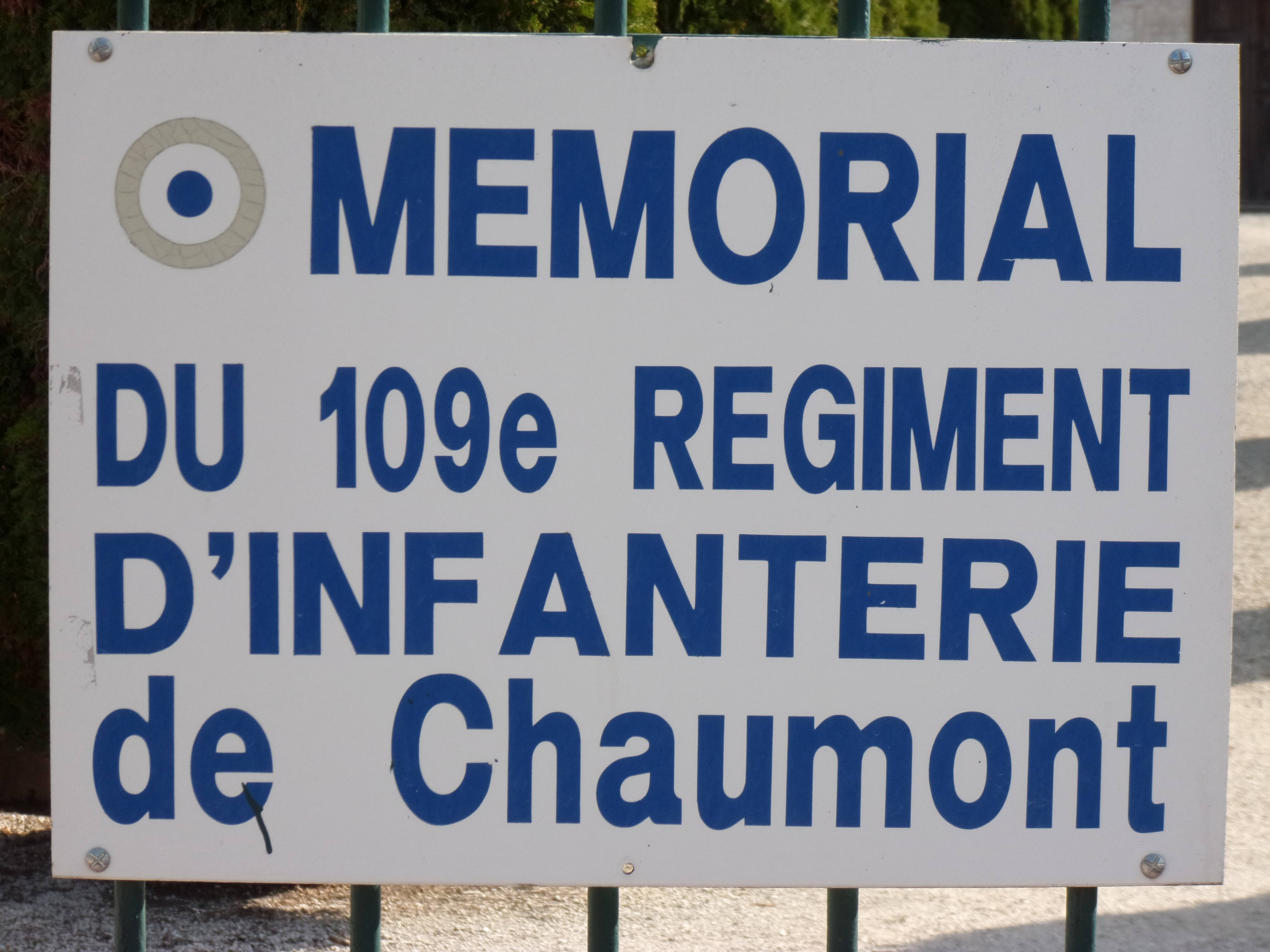 Mémorial du Template:109e régiment d'infanterie. Photo prise à l'entrée du cimetière de Chaumont.